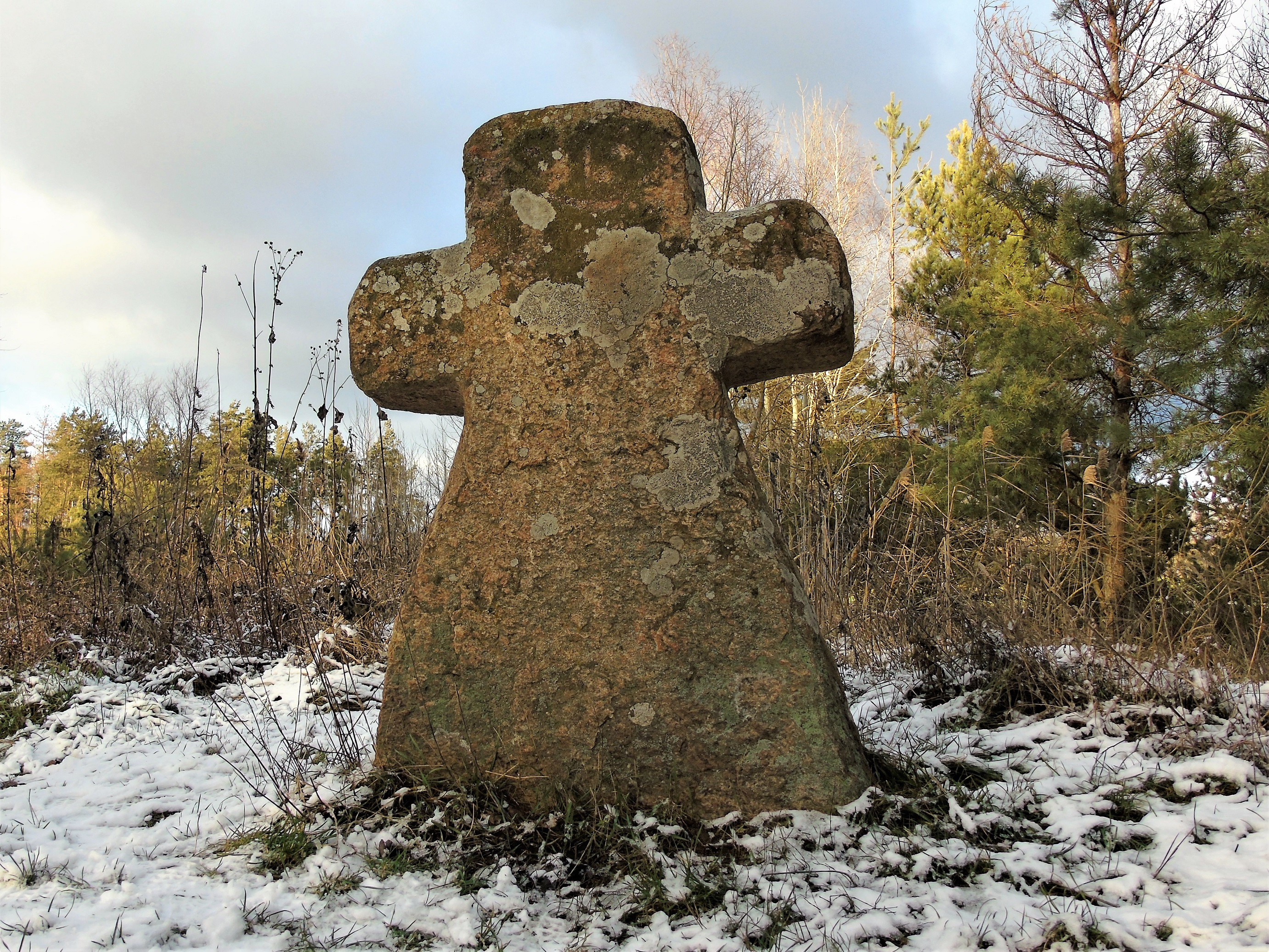 Stone "baba" in Neple (Lublin Voivodeship, Poland)